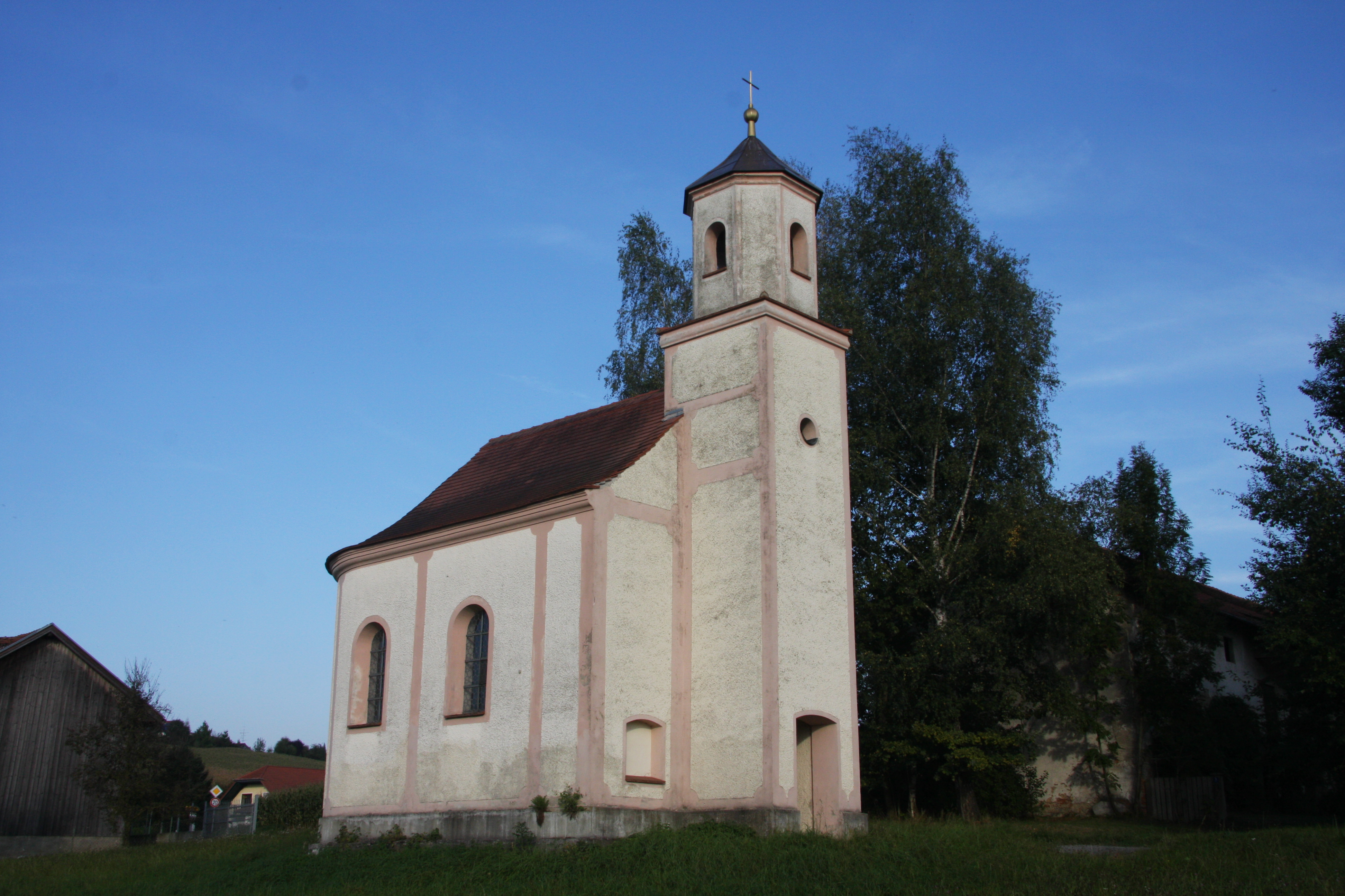 Kath. Kapelle St. Martin in Heft, erbaut 1722This is a photograph of an architectural monument.